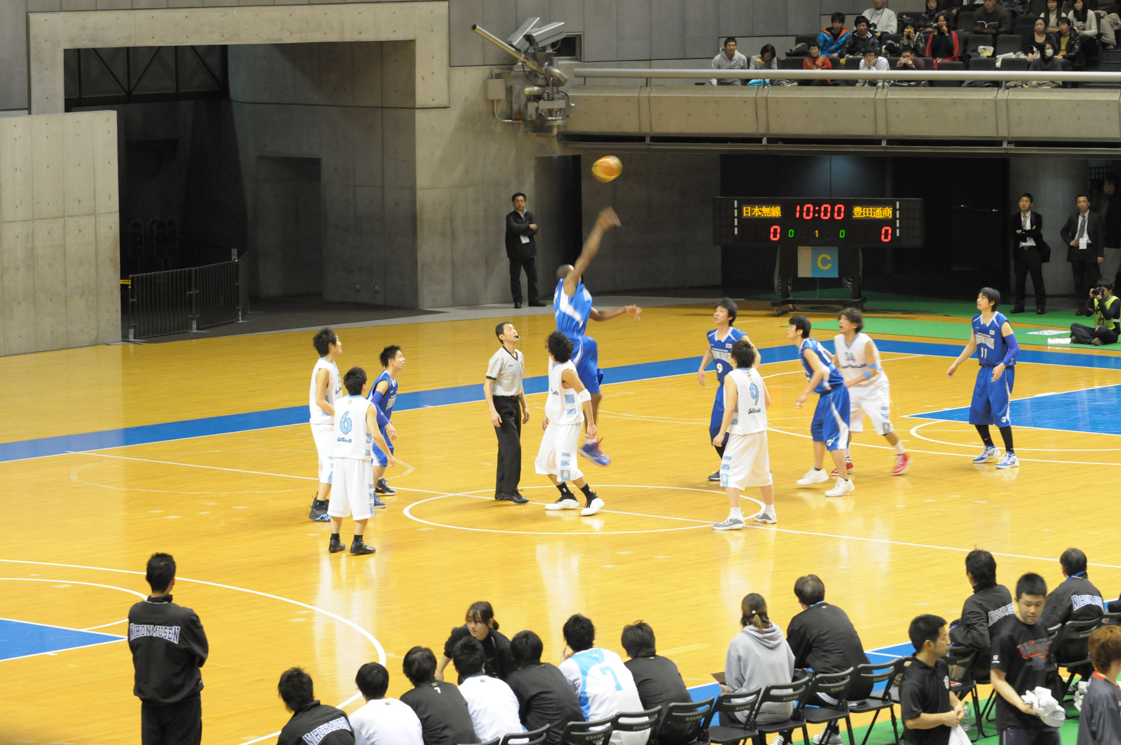 2012年全日本総合バスケットボール選手権大会2回戦、日本無線対豊田通商ファイティングイーグルス。東京体育館で。